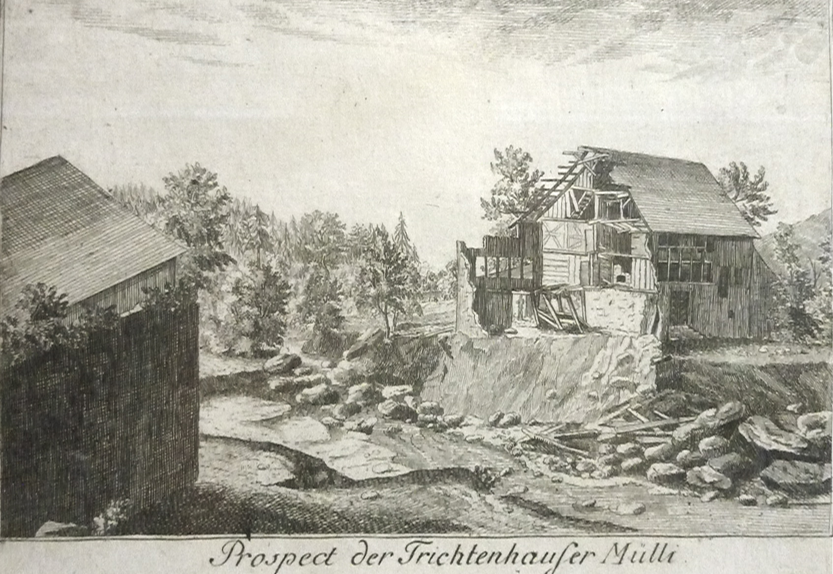 Mühle Trichtenhausen: nach dem Unwetter von 1778